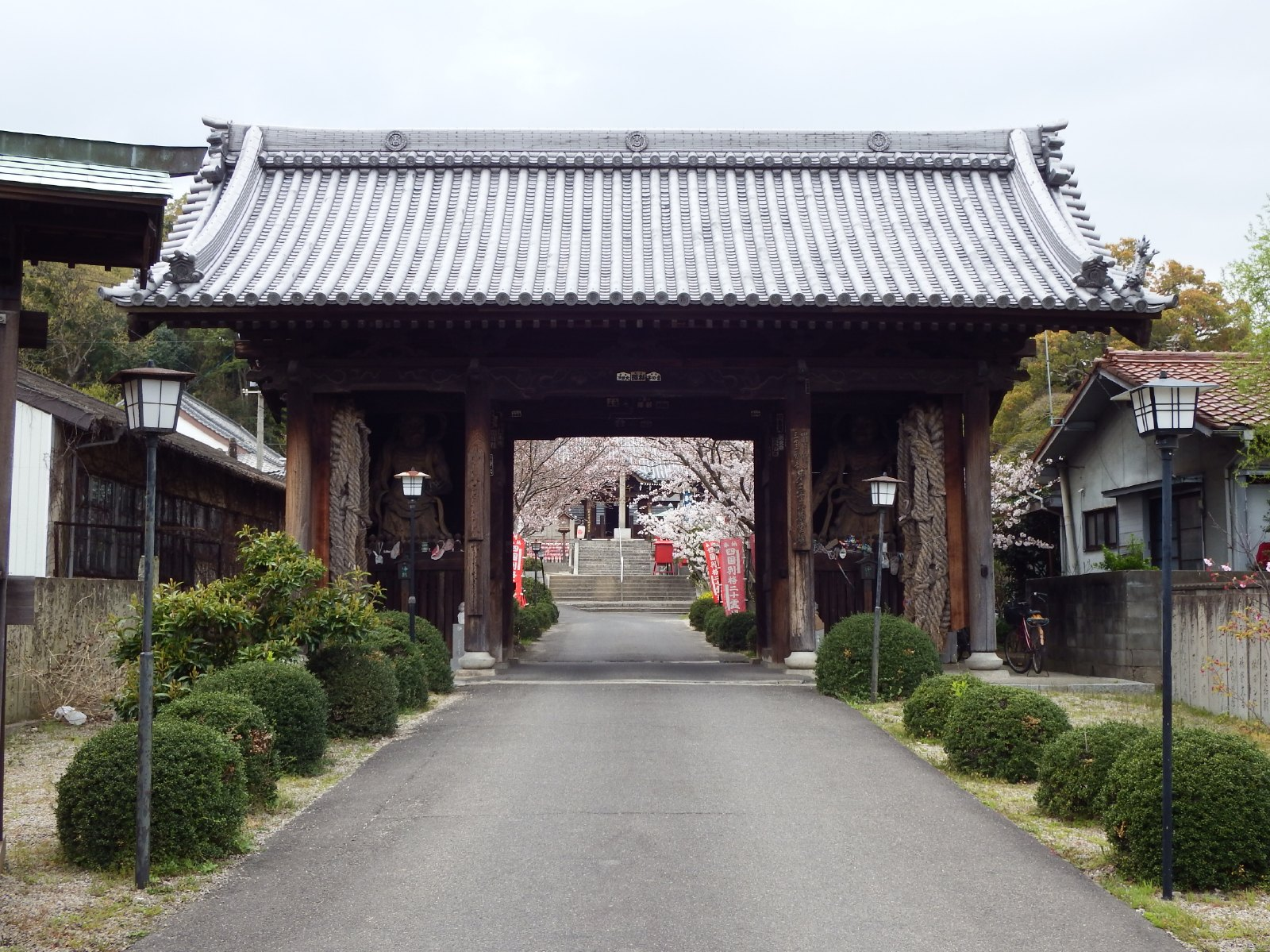 香西寺の仁王門